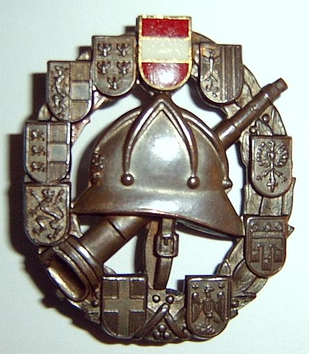 Leistungsabzeichen in Bronze der österreichischen Feuerwehr